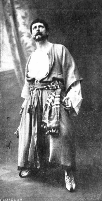 Fotografía del actor español Enrique Borrás caracterizado como Otelo publicada en 1912, poco antes del inicio de una gira americana.